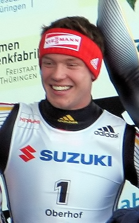 Der WM Sieger im Herren-Einzel 2008 Felix Loch (Weltmeister)